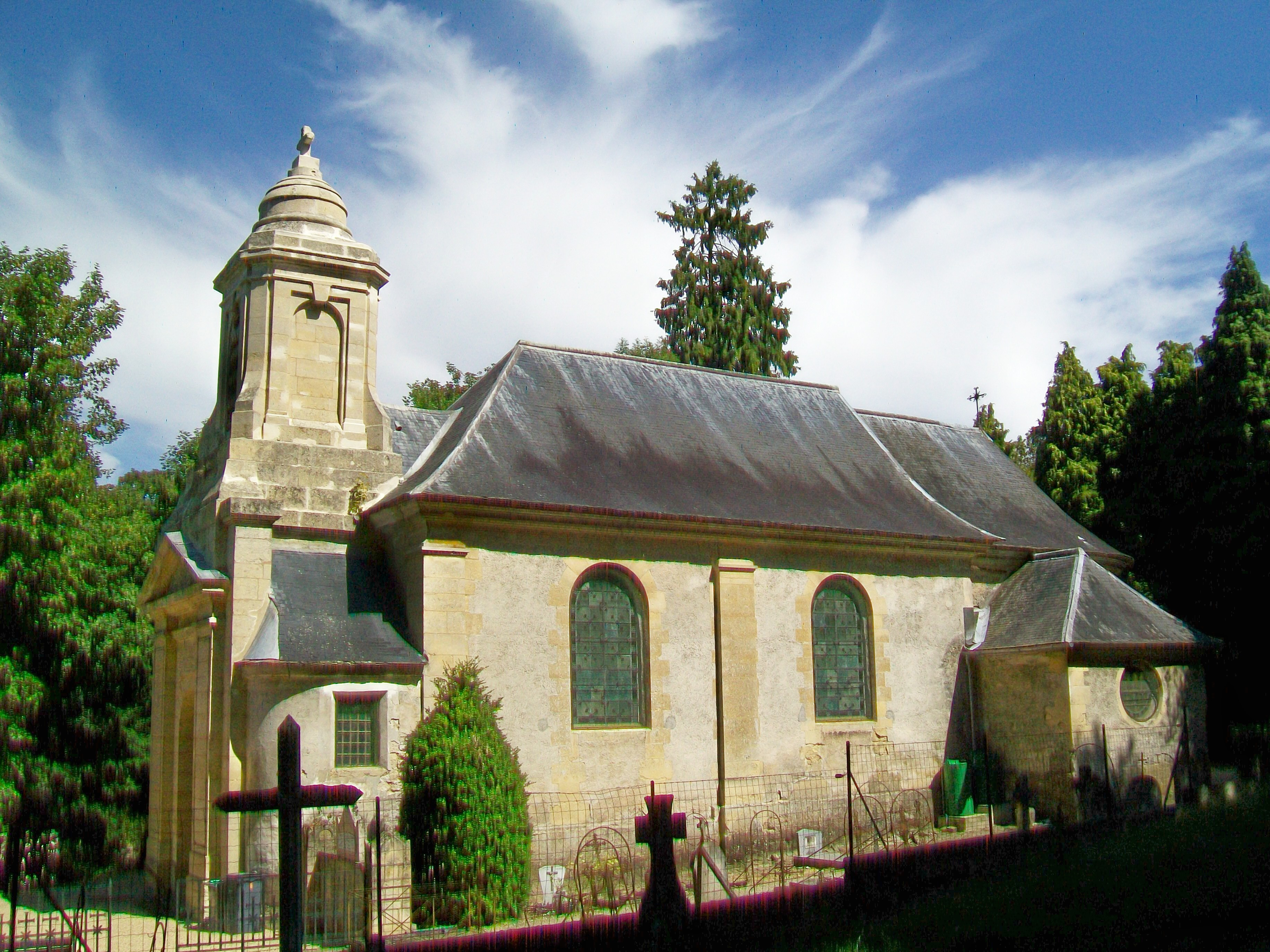 L'église Saint-Eutrope, façade sud-ouest le long du cimetière (au premier plan).